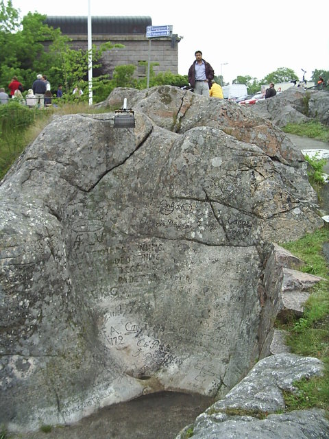 Kungsgrottan. Jättegryta vid fallfåran i Trollhättan. Här har Sveriges kungligheter skrivit sina namnteckningar sedan 1700-talet (Adolf Fredrik) och till Sveriges nuvarande kungapar. Senaste namnteckning gjord av Kronprinsessan Victoria 22 augusti 2001.